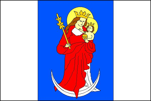 Vlajka obce Paskov